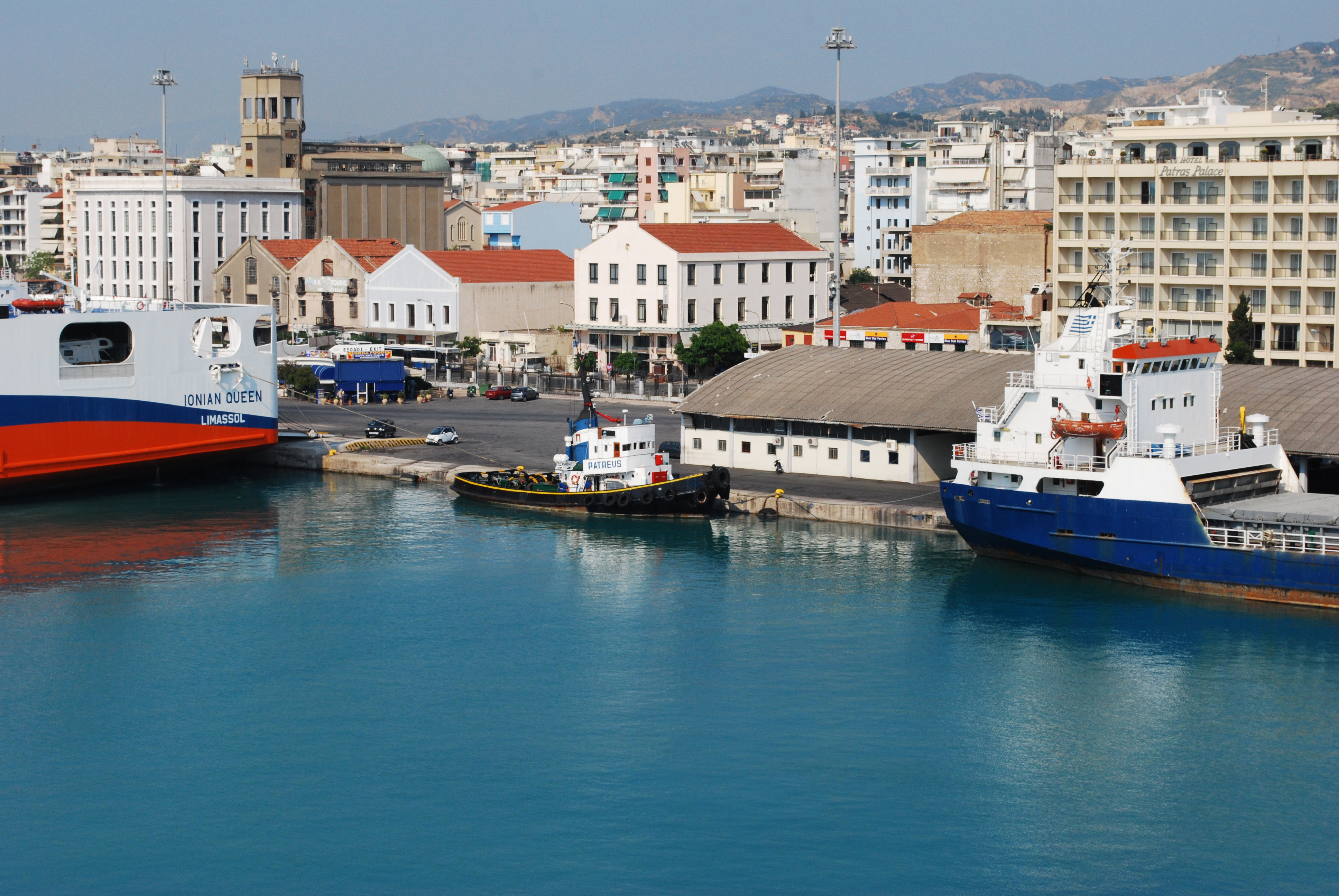 Le port de Patras en Grèce en août 2009.